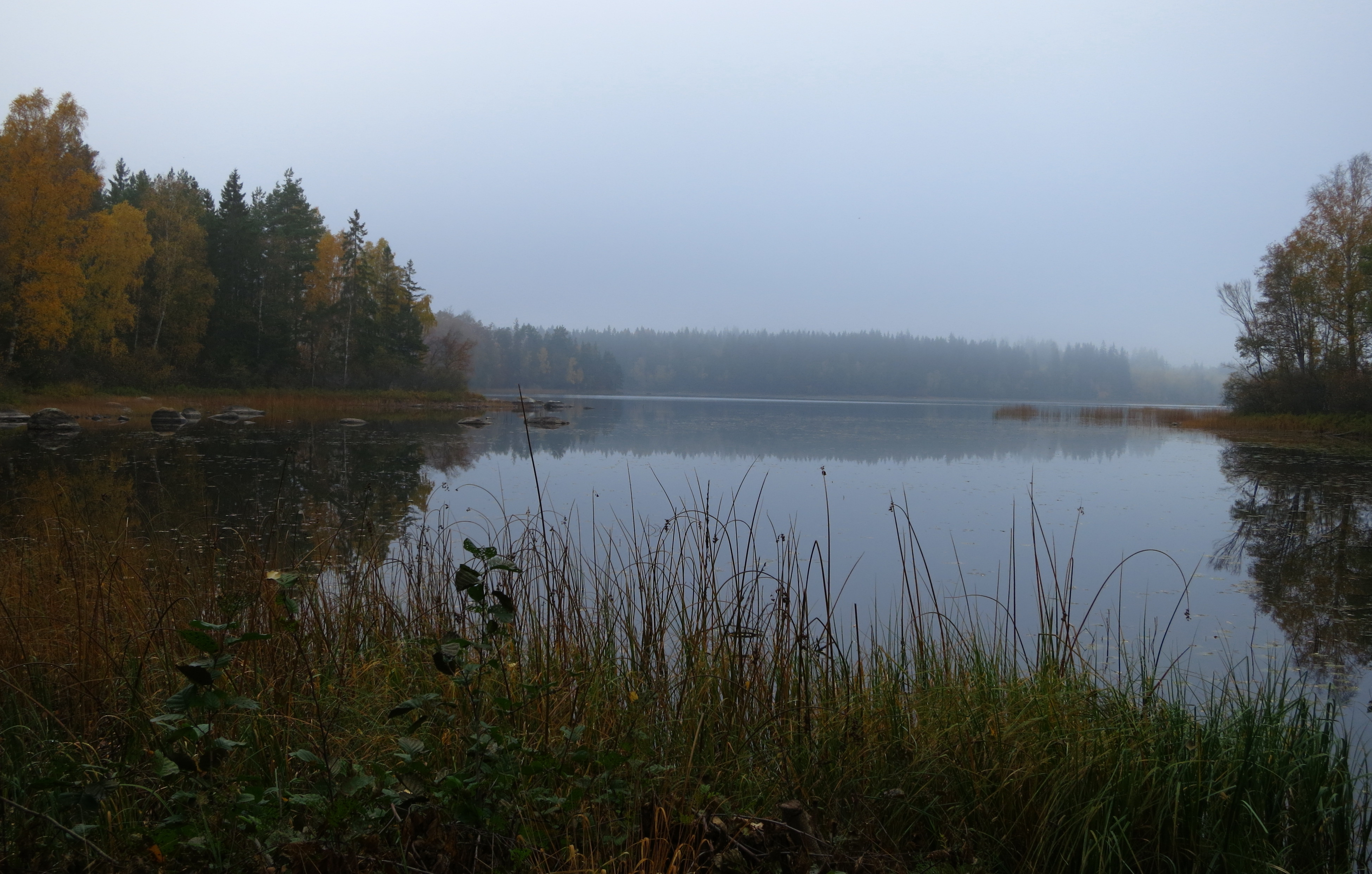 Sjön Kvesen, Tingsryds kommun